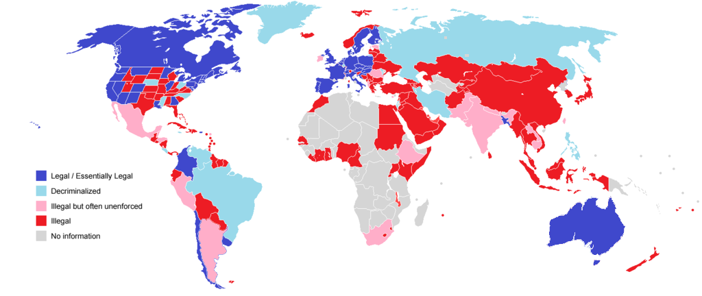 医療大麻または大麻由来医薬品に関する各国の法規制